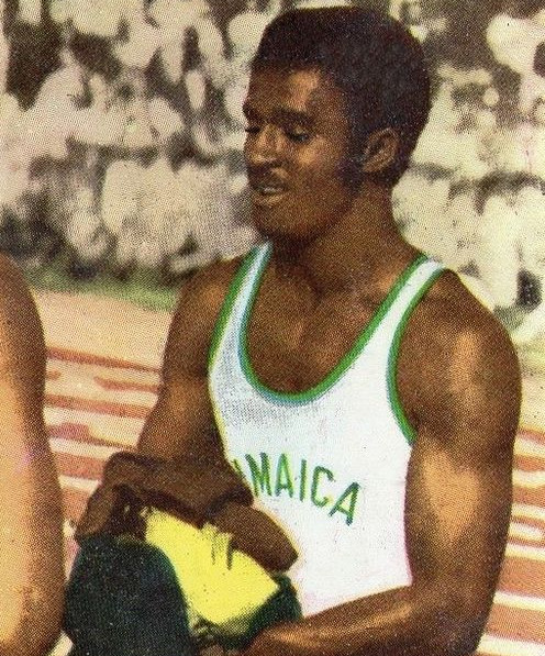 MUNCHEN/MONACO '72-PANINI-Figurina n.63- QUARRIE-JAMAICA-ATLETICA-Recuperata